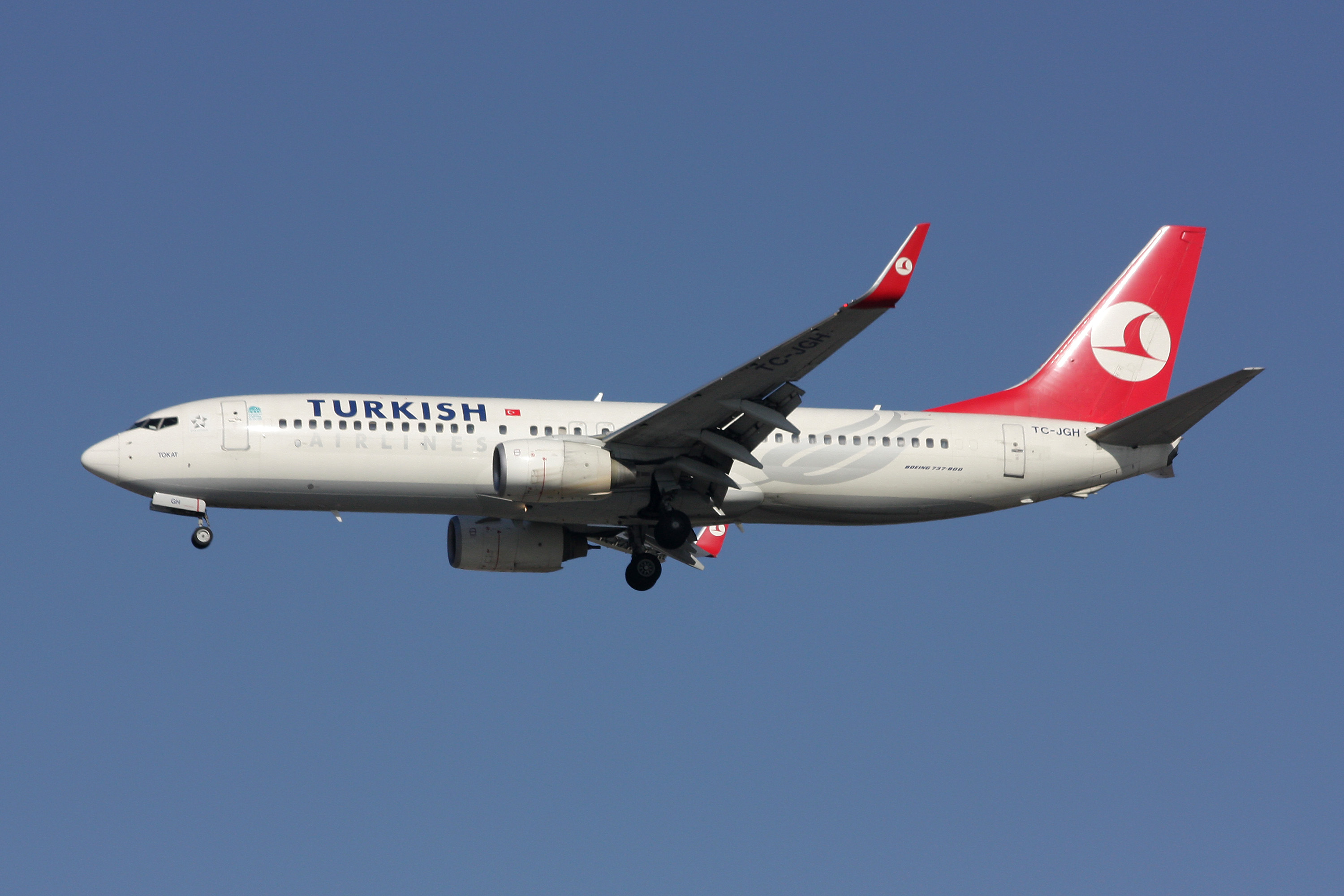 Boeing 737-800 TC-JGH Turkish Airlines en finale pour la piste 27R à CDG/LFPG.